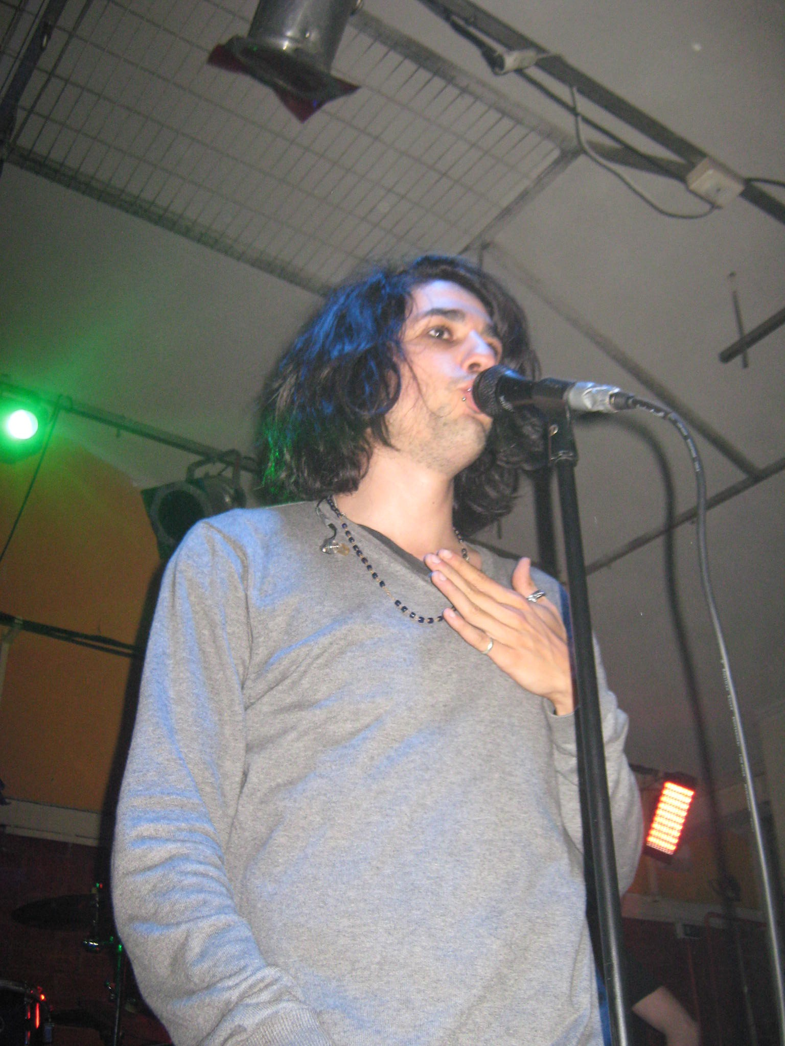 Concierto Chile 2011